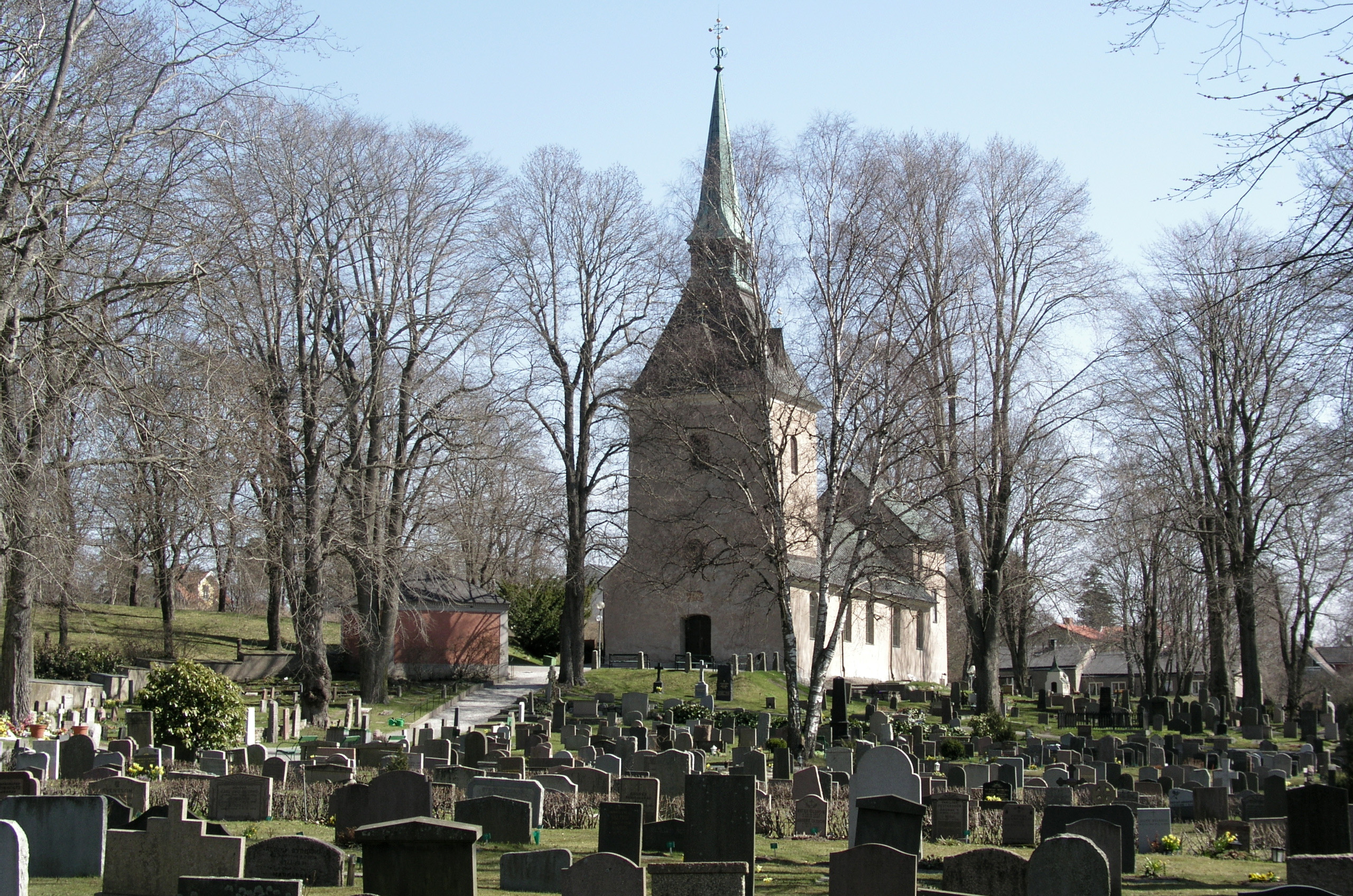 Brännkyrka kyrkaBrännkyrka, Älvsjö, Stockholm, Sweden